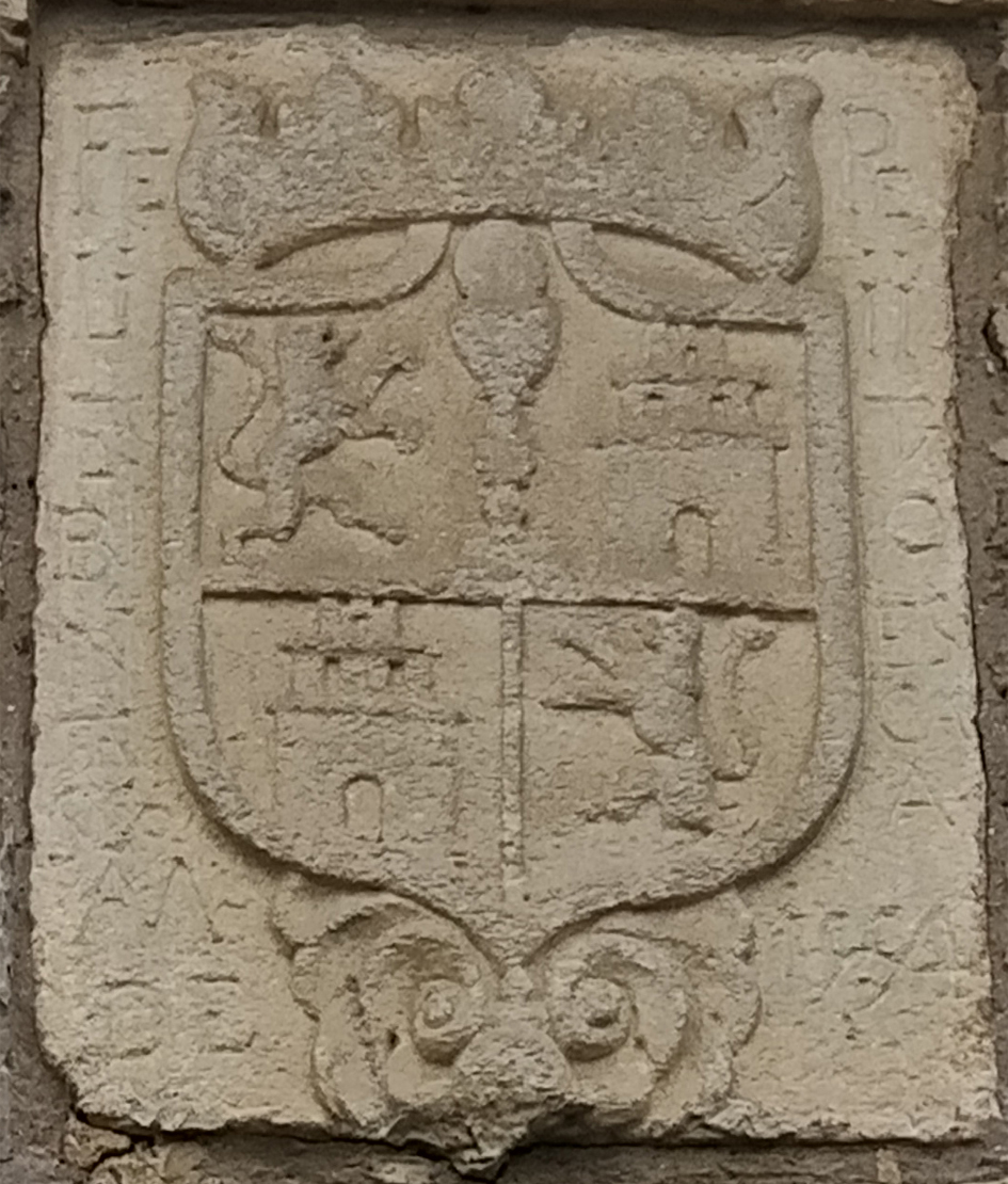 Armas de Galiza no escudo real de 1554 na Casa de Filipe II, tamén coñecida coma Pazo de Barral, en Sarandós (Abegondo).